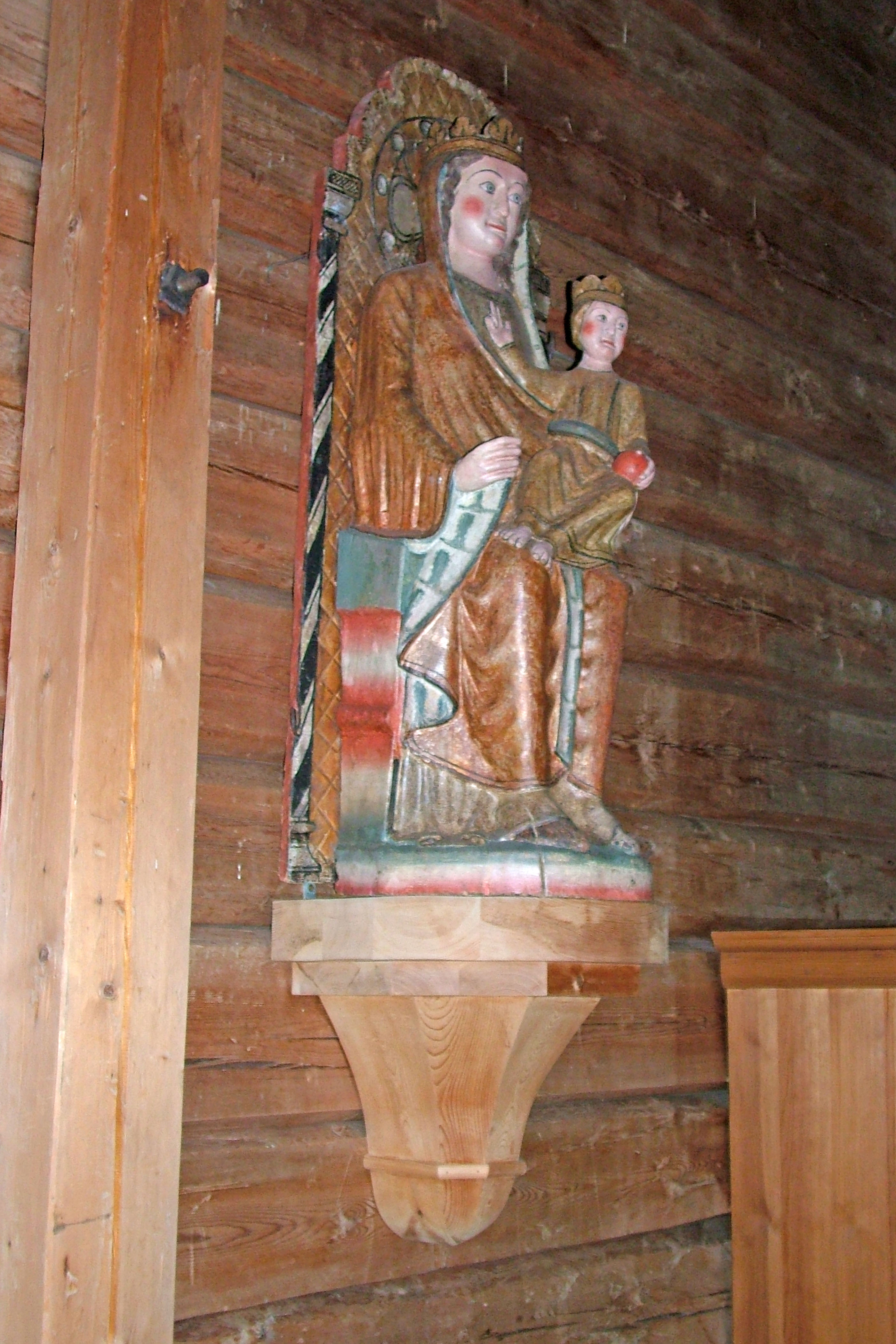 Vallset kirke. Treskulptur av madonna med barnet er fra ca. 1200. Ukjent om det er et bestillingsverk eller en bortgjemt kunstskatt fra før reformasjonen. Treskulpturen kom tilbake fra Hedmarkmuseet til Vallset i 1961. Den ble restaurert siste gang i 1995.